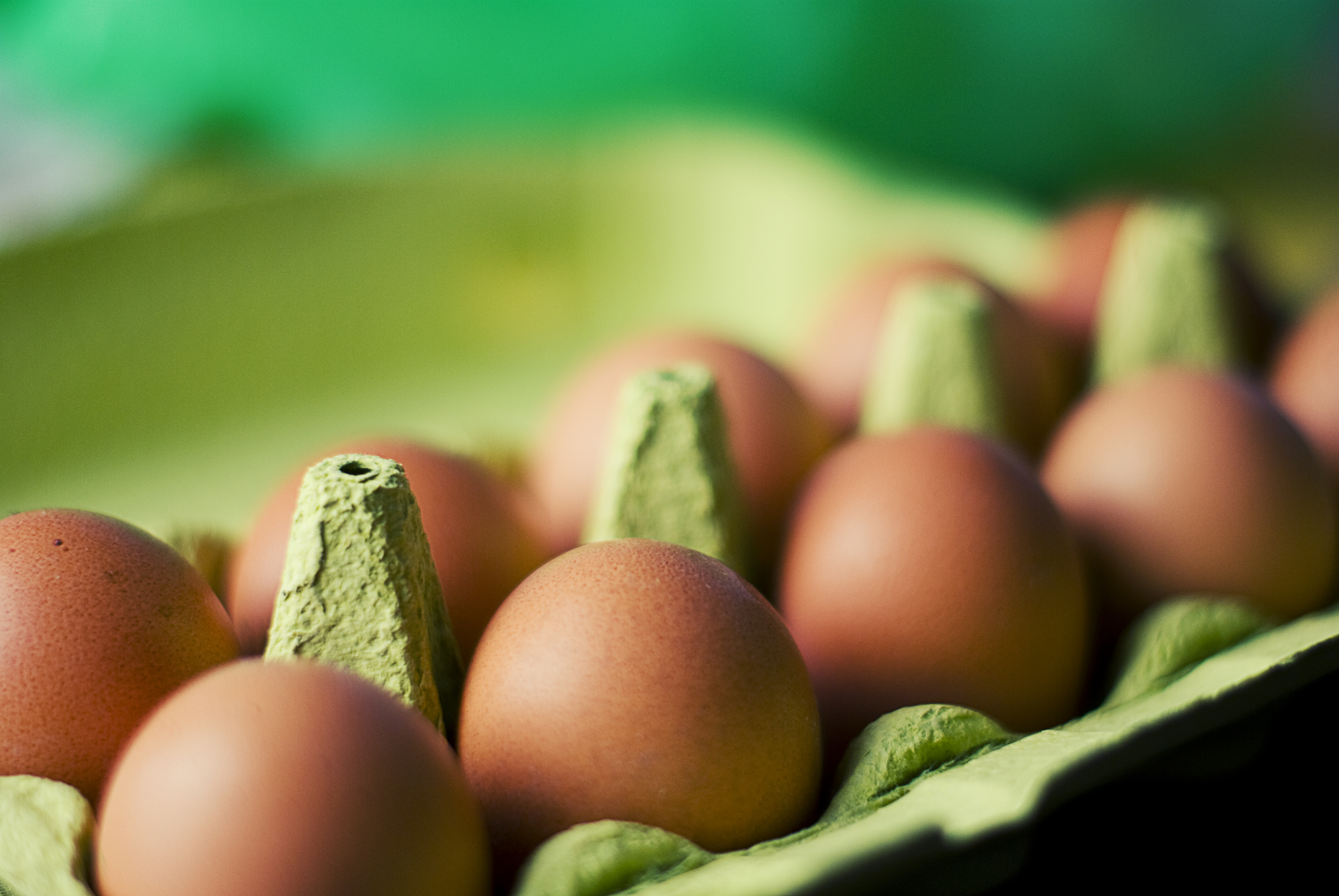 food-eggs-box